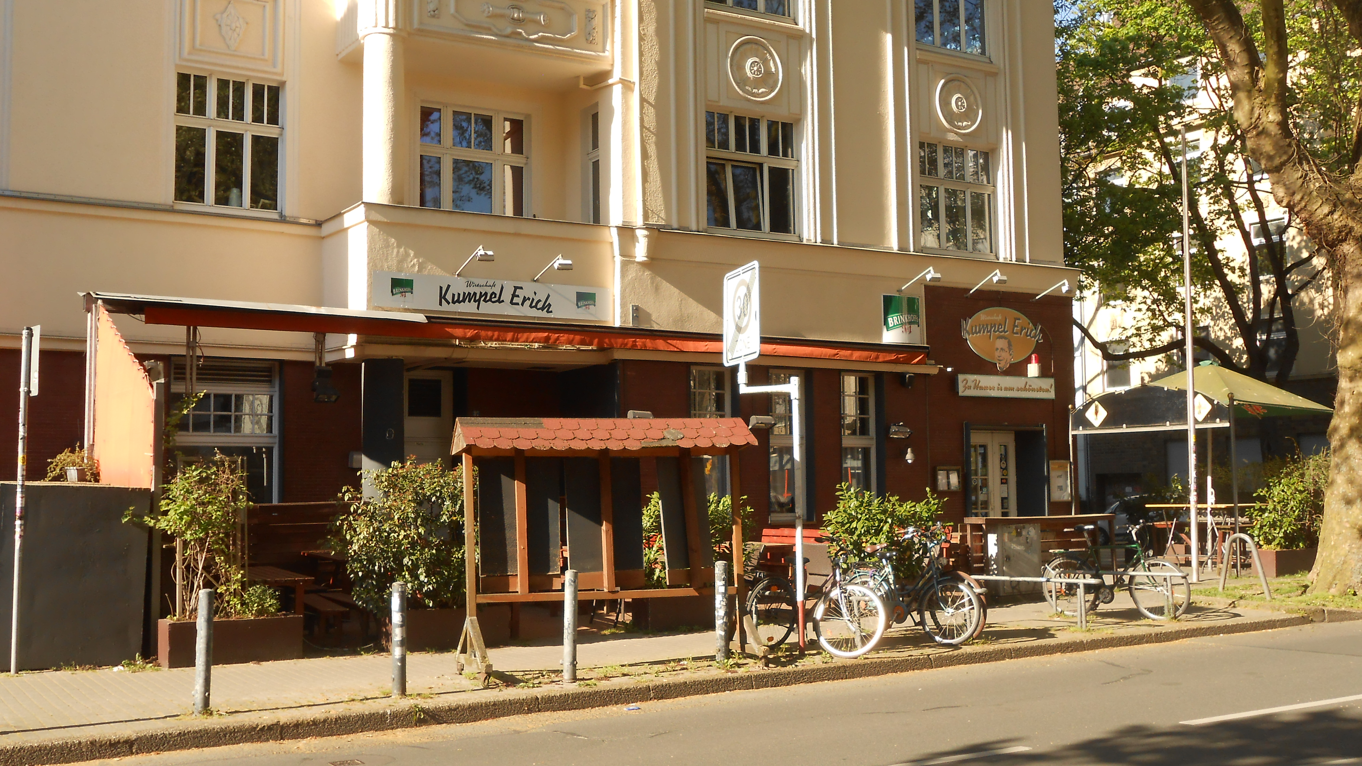 "Kumpel Erich", Kneipe, Restaurant und Café auf der Lindemannstraße, Ecke Kreuzstraße, im Dortmunder Kreuzviertel.